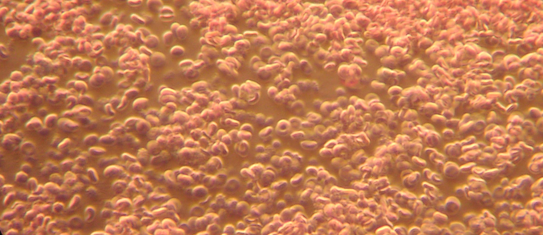 Menschenblut bei 1000 fach im Dunkelfeld. Rechts oben beginnt schon die Gerinnung. Während der Aufnahme floss das Blut von rechts nach links. Ausschnitt ca: 200µm x 100µm